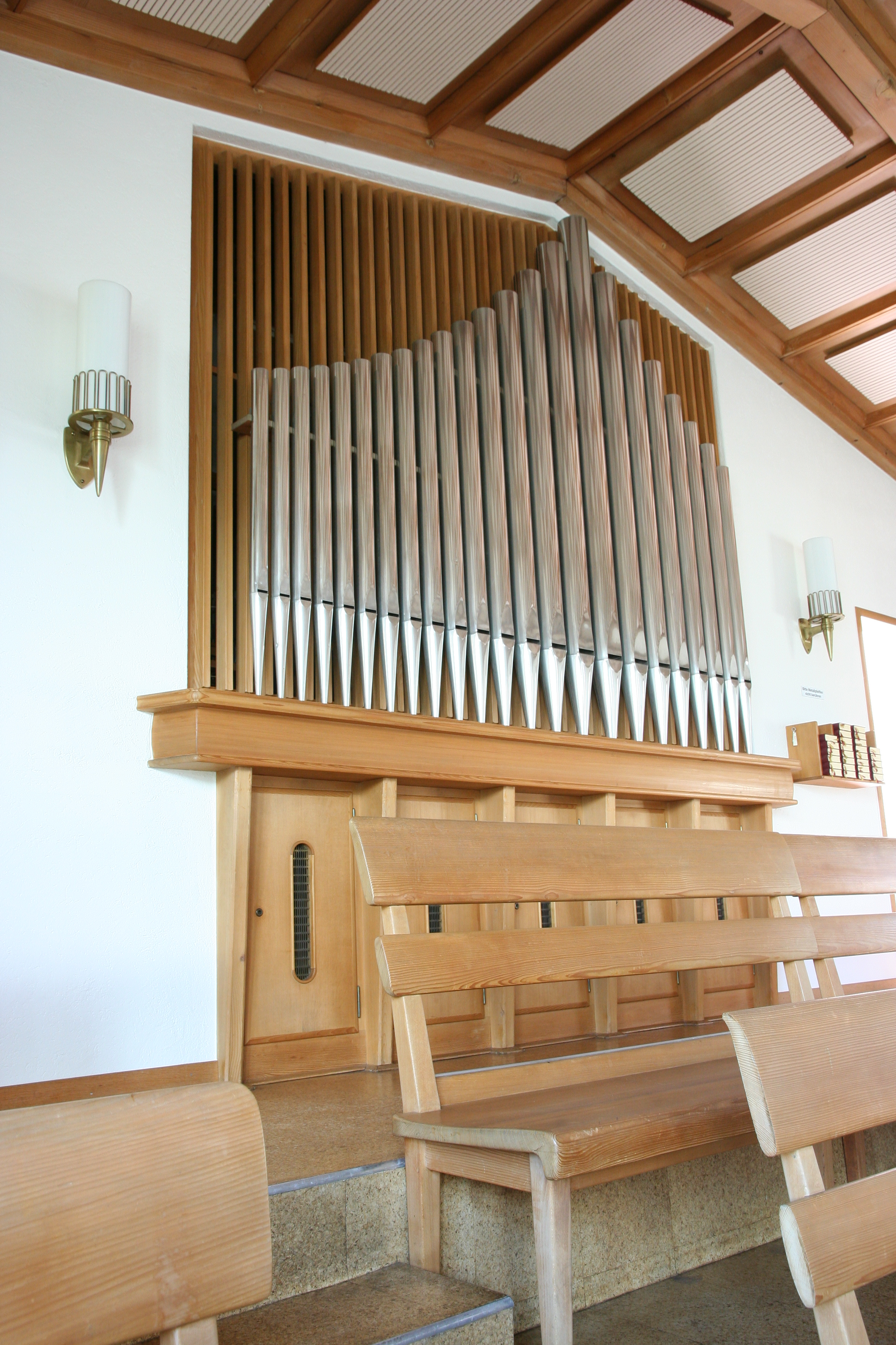 Matthäuskirche Zürich im Quartier Unterstrass